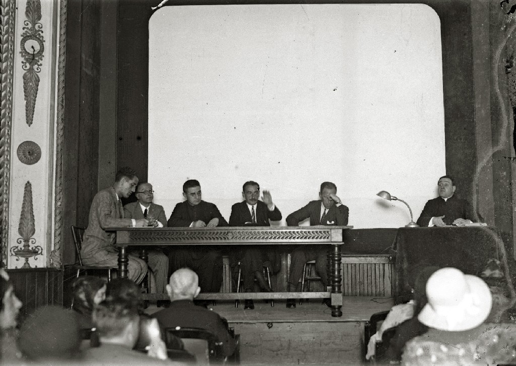 Título original: Celebración de una conferencia en la que toma parte el sacerdote y escritor nacionalista tolosarra José de Ariztimuño Olaso 'Aitzol' (1/1) Localización: Guipúzcoa